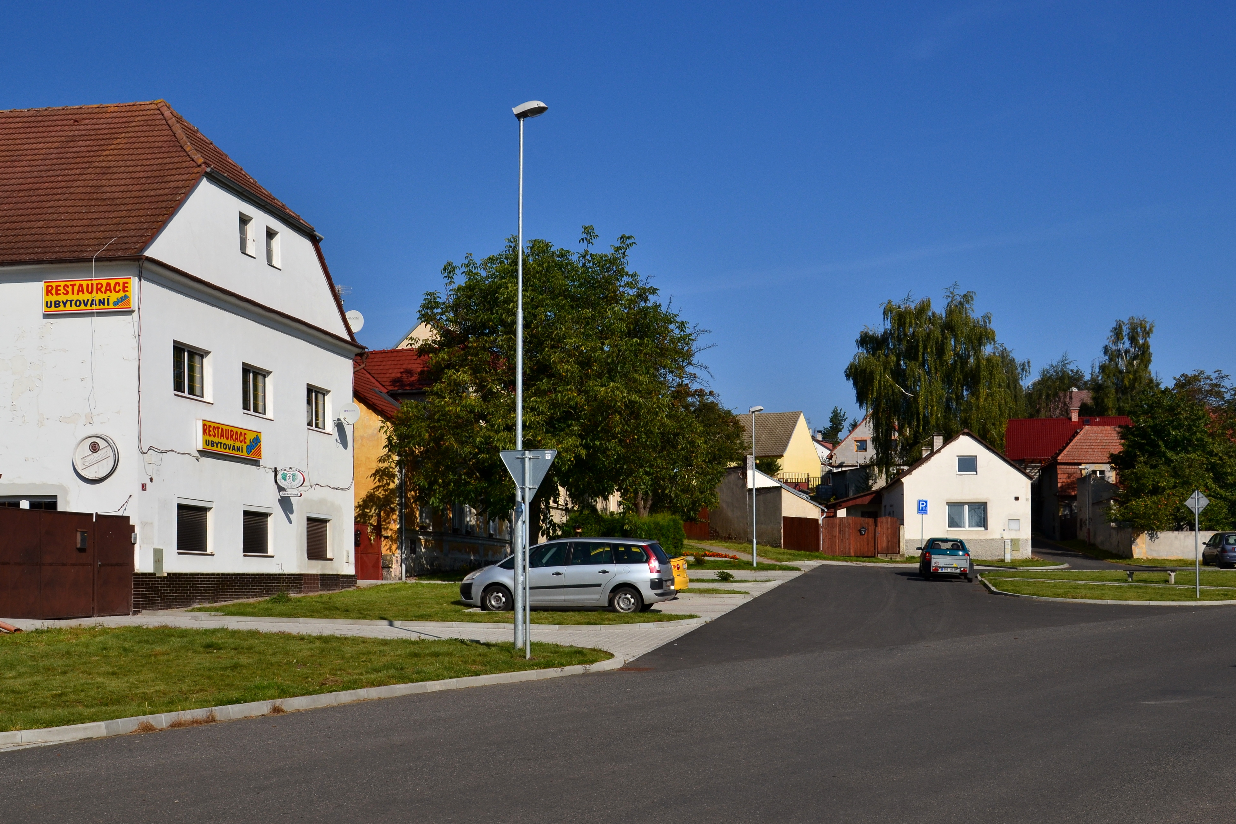 Buškovice - náves pod kostelem